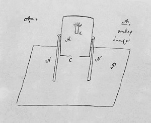 Il dispositivo aeronautico disegnato da Kibal'cic